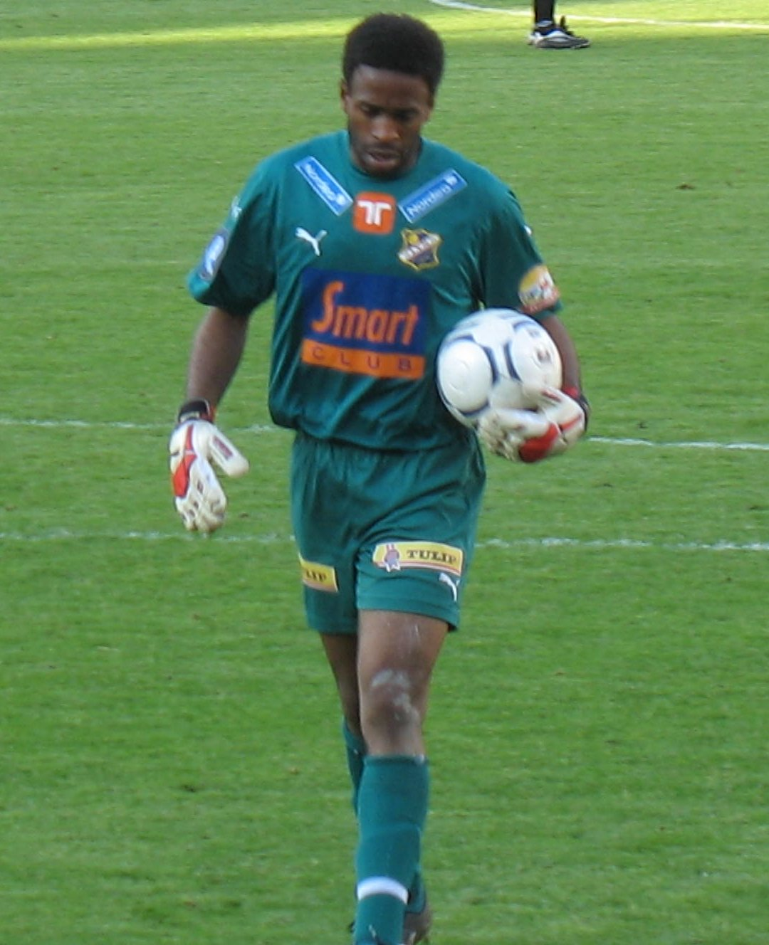 Fotballspilleren Eddie Gustafsson